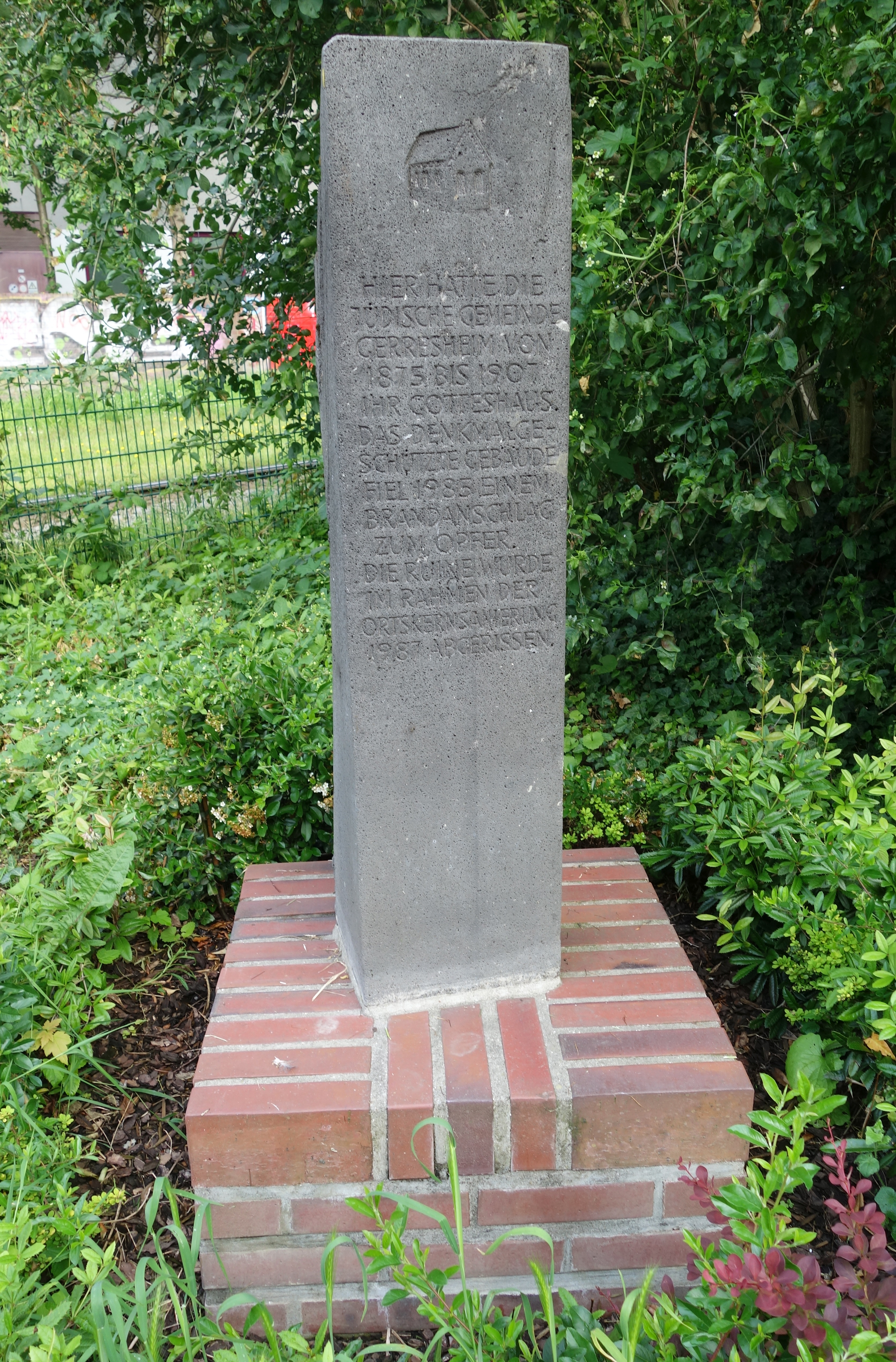 Synagogen Gedenkstein, Düsseldorf-Gerresheim. 2019.